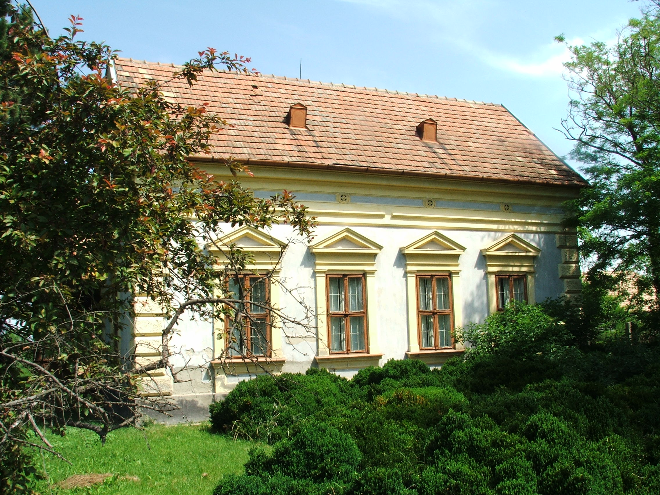 Csók István Emlékmúzeum, Cece This is a photo of a monument in Hungary. Identifier: 3582